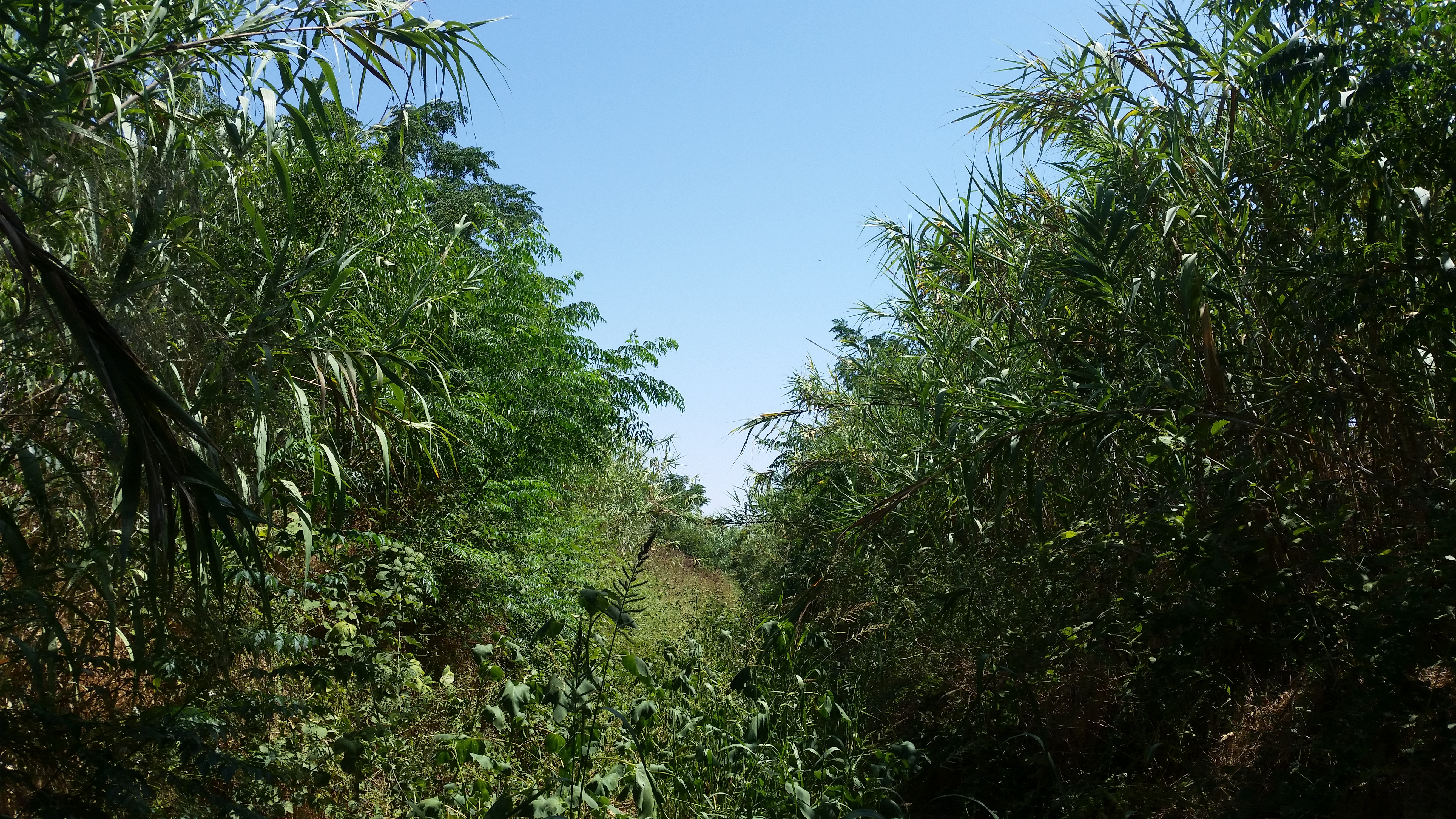 ערוץ נחל חנין וחישות הקנה הגדלות על גדותיו באזור נס ציונה